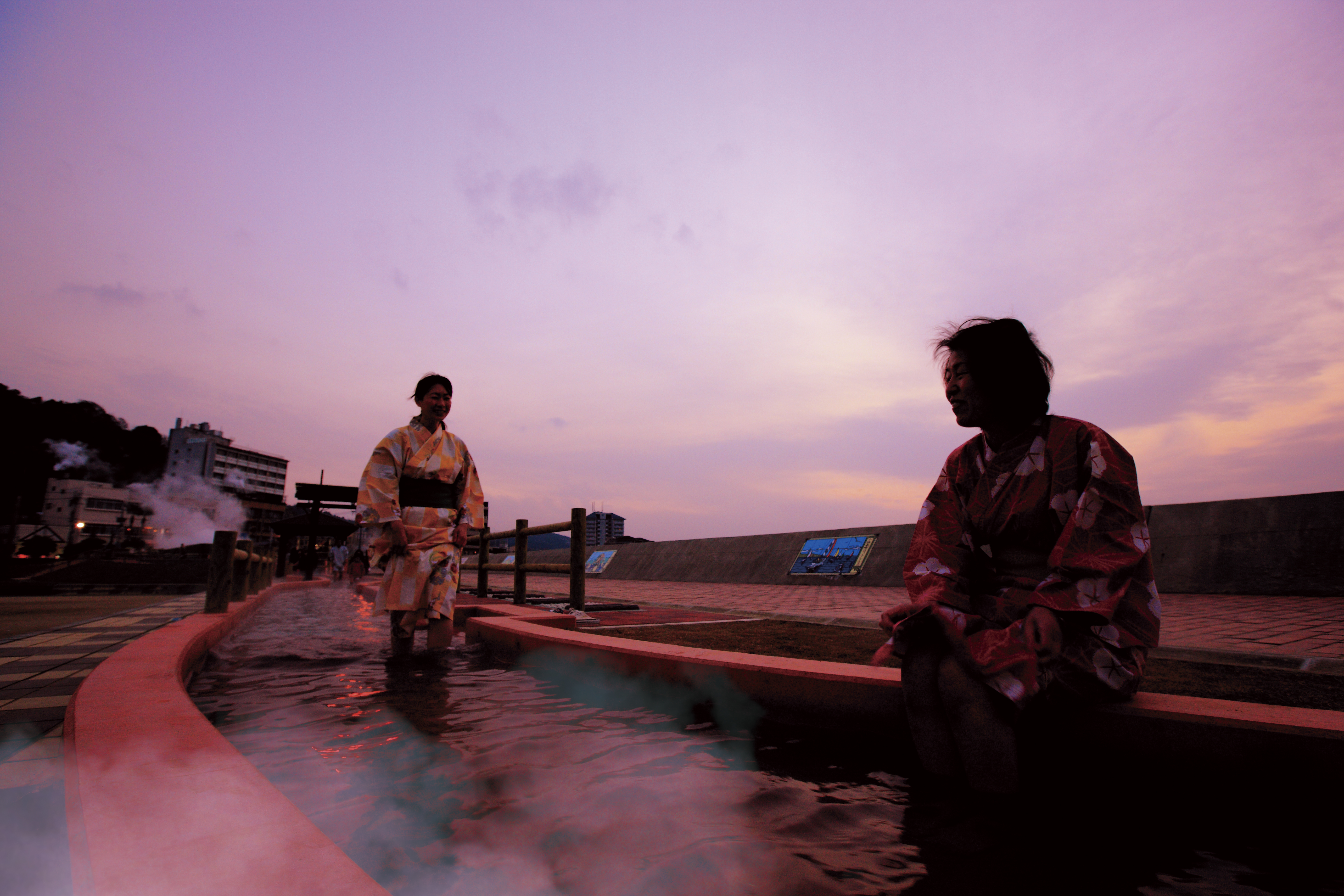 足湯の写真を撮りました。追記：記事内での記述によると小浜温泉。